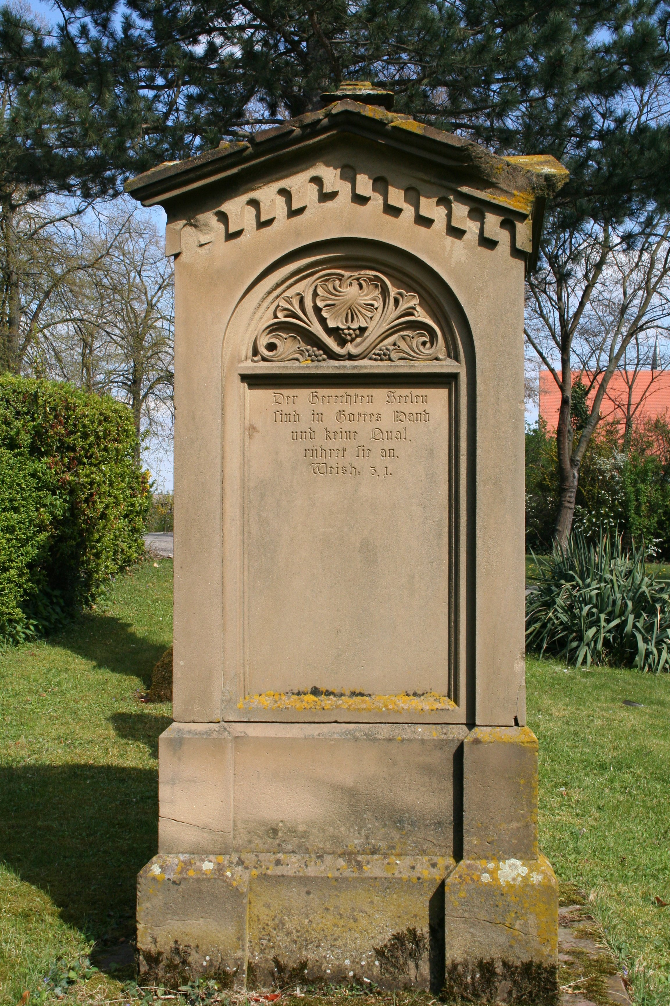 Worms-Horchheim Seitenansicht des Grabmals für Konrad Schredelseker auf dem ehemaligen Friedhof